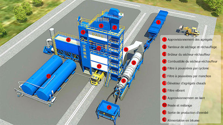 Structure de principe d'une unité de production d'enrobé bitumineux.